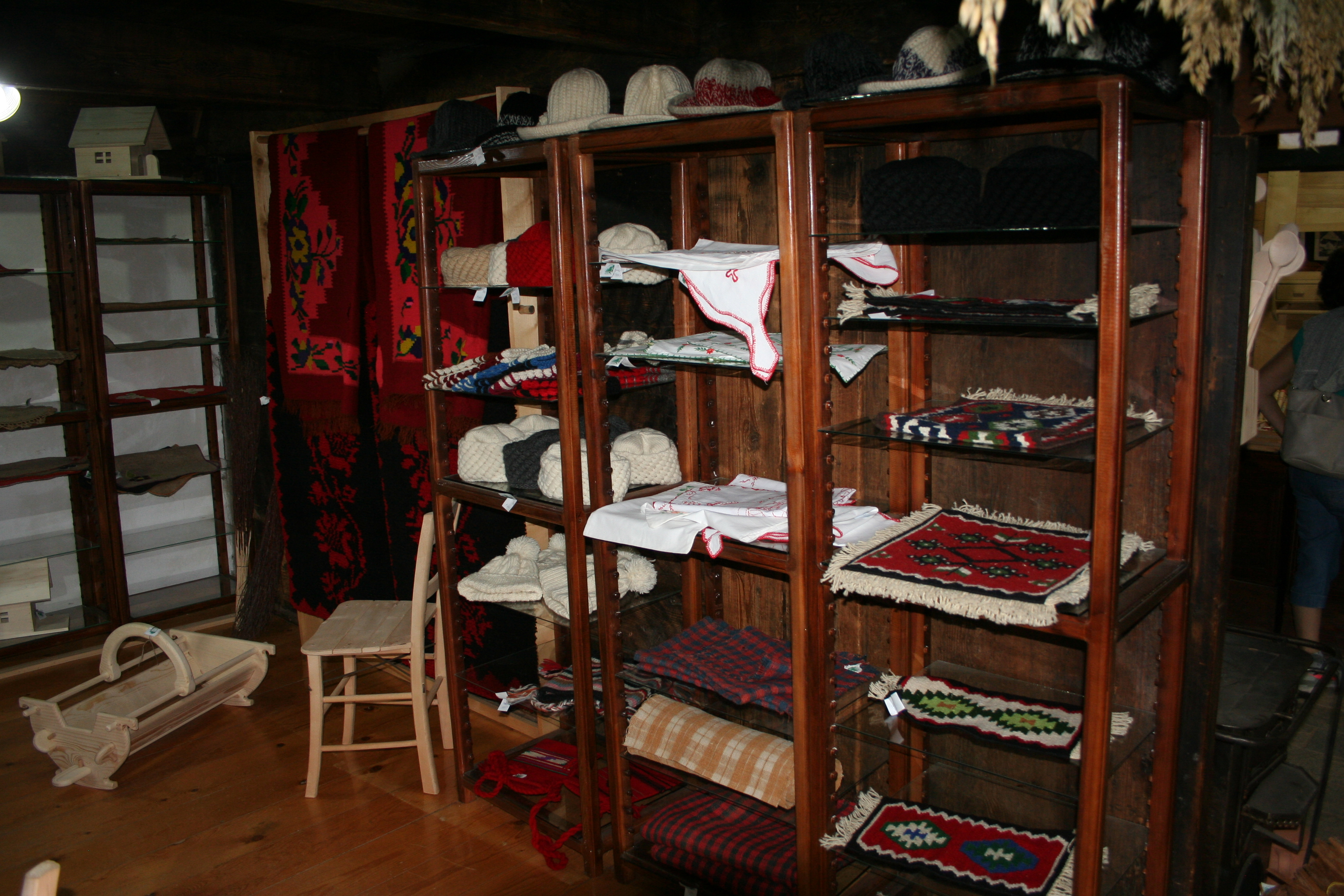 Muzej "Staro selo" Sirogojno